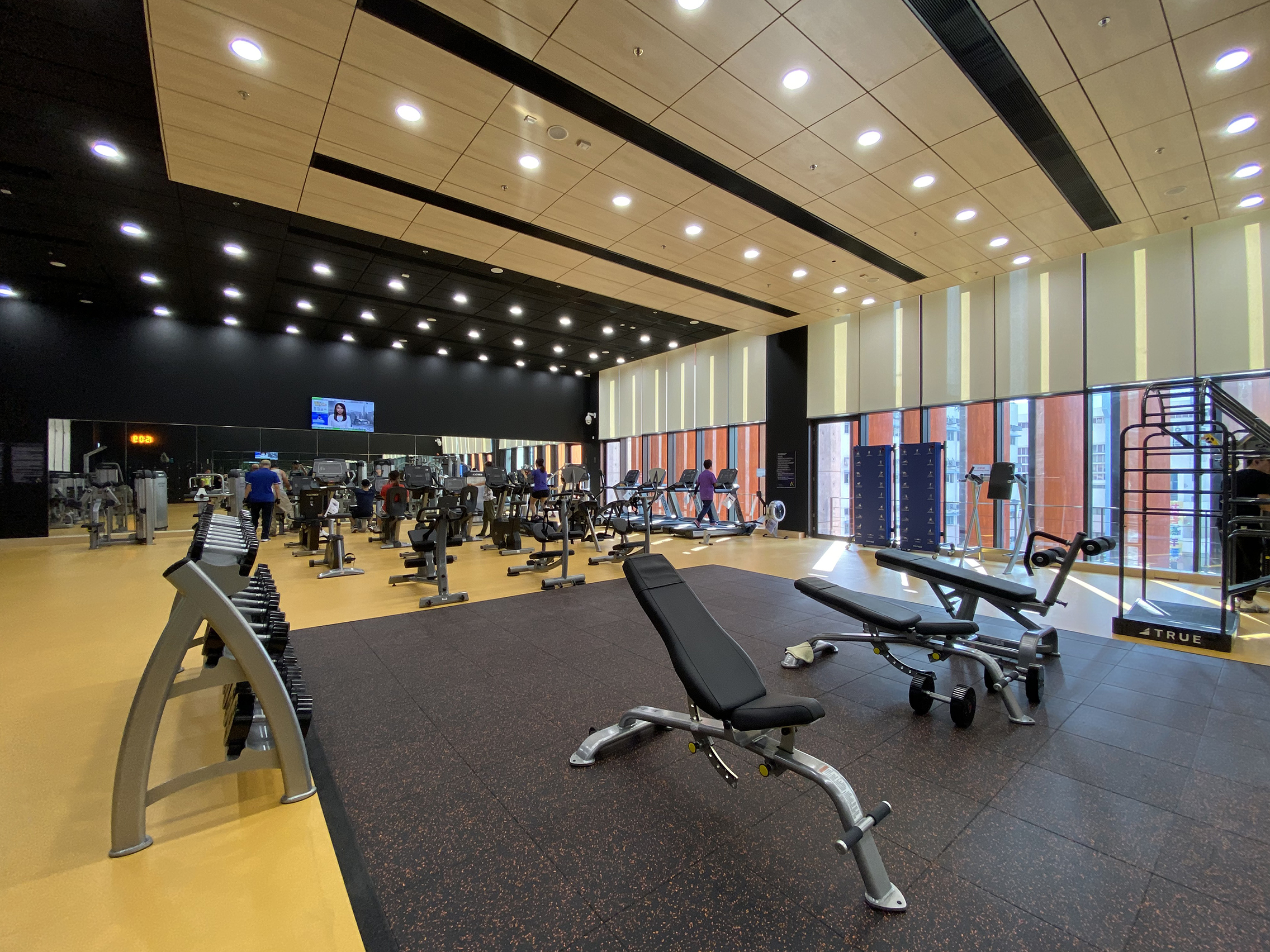 Siu Lun Sports Centre Gym Room